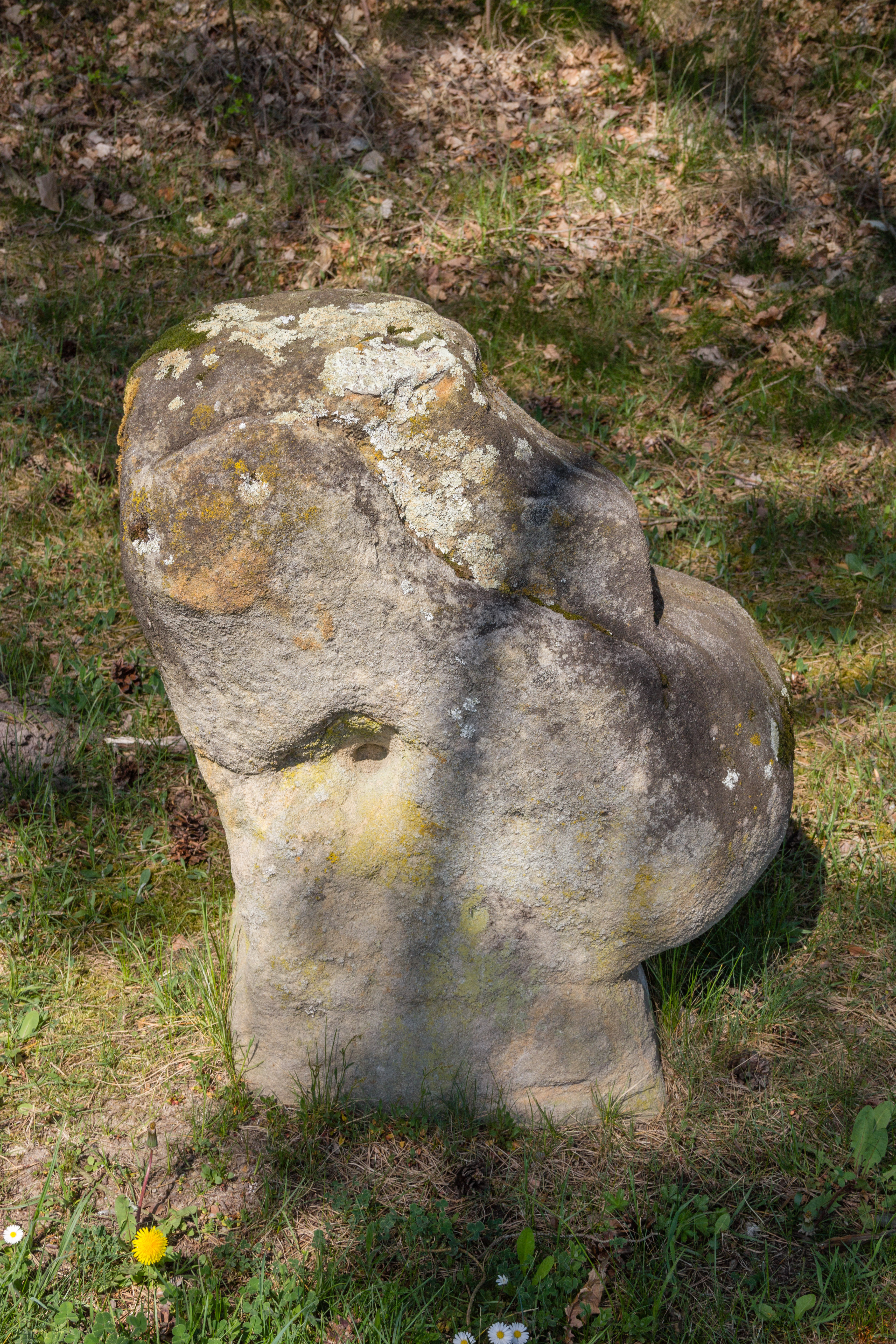 Steinkreuze, Lauf an der Pegnitz, Simmonshofen am Höllweiher, Kreuz 2, Sicht von vorne